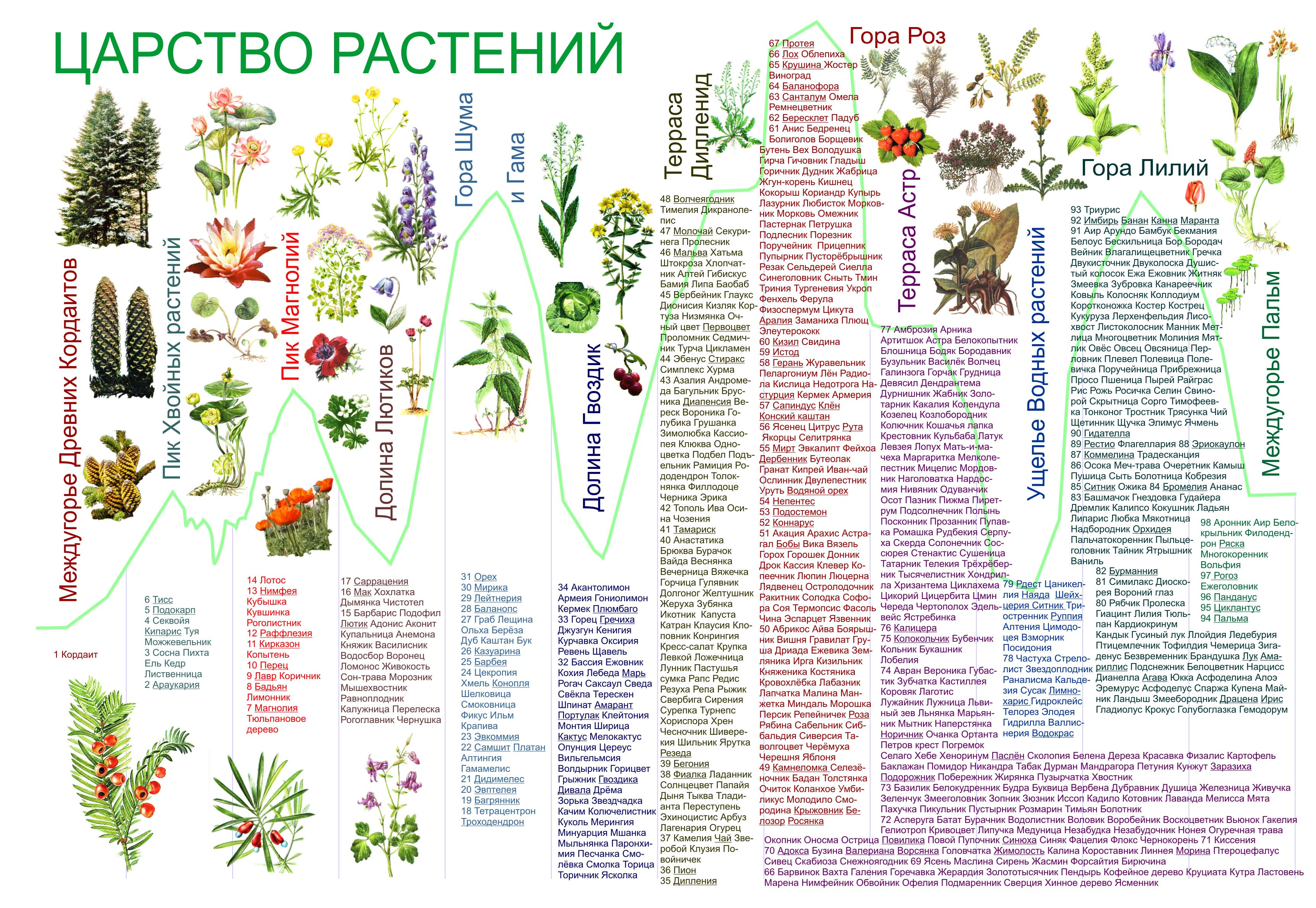 Карта "Царство растений" из детской природоведческой игры Льва Баньковского. Источник: Экологическая психология и психология одарённости // Проблемы регионального образования от ДОУ до вуза в условиях Верхнекамья: Мат-лы Всеросс. науч.-практ. конф. преподавателей, учителей, студентов. 26-27 апреля 2007 г. Учёные записки. В.6. Ч. 3. – Соликамск: Изд-во СГПИ, 2007. – С. 4-20 (для статьи Баньковский Лев Владимирович)